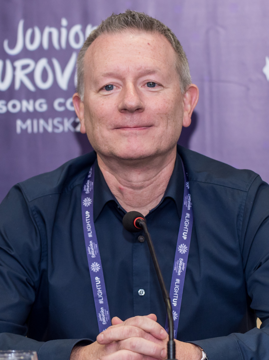 Юн Ула Санн на пресс-конференции Детского Евровидения 2018.